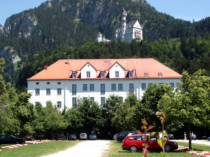 Blick von der Schwangauer Straße über den Parkplatz zum Internatsgebäude des Gymnasiums Hohenschwangau, zu Füßen des Schlosses Neuschwanstein